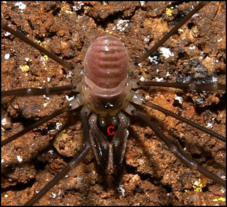 Sabacon paradoxum mâle en vue dorsale montrant les deux bosses glandulaires chélicériennes (C).